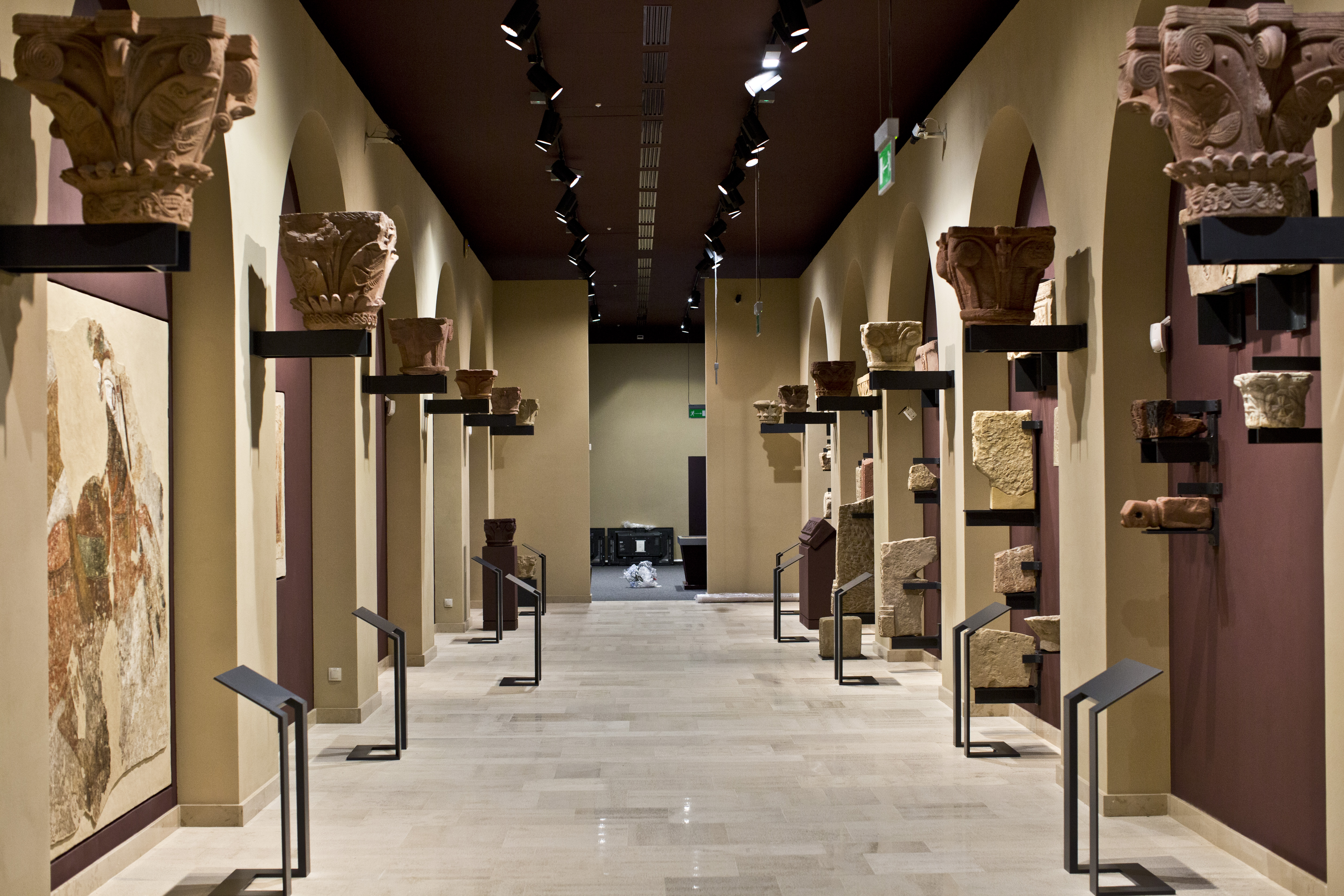 Muzeum Narodowe w Warszawie, Galeria Faras